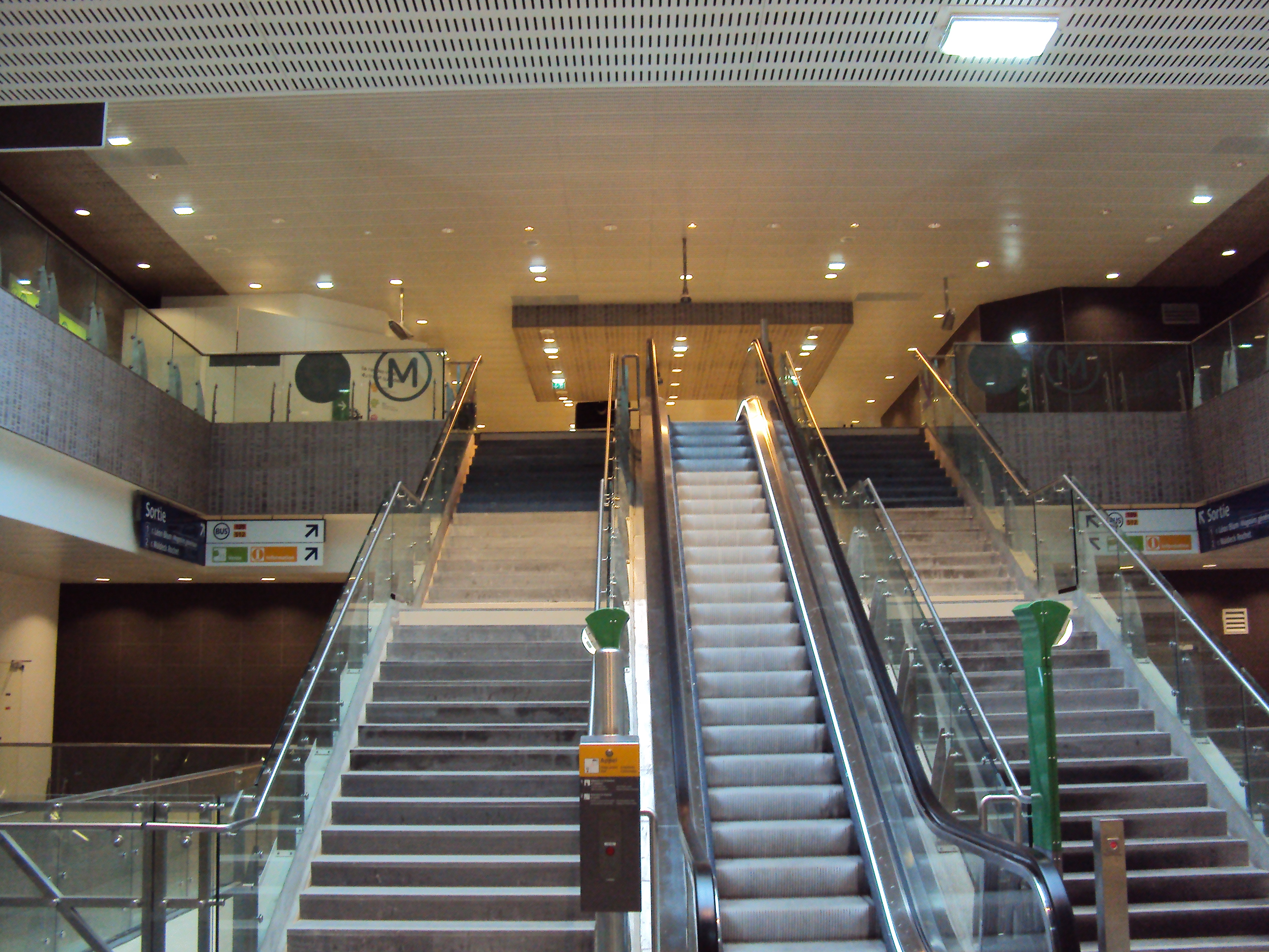 Metro front populaire - decembre 2012